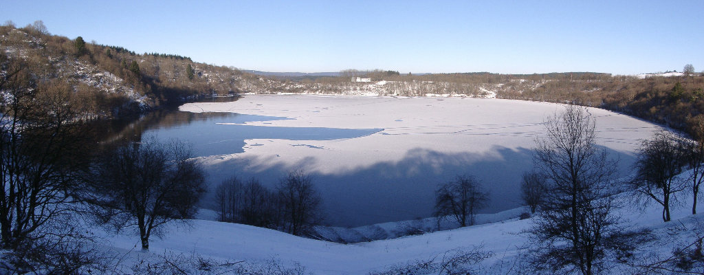 Weinfelder Maar Beschreibung: Weinfelder Maar mit Blick auf die Kirche von Weinfeld Quelle: eigenhändig fotografiert Januar 2002 Fotograf oder Zeichner: Francis Lizenzstatus: GNU FDL oder Public Domain Afbeelding:Weinfelder maar.jpg